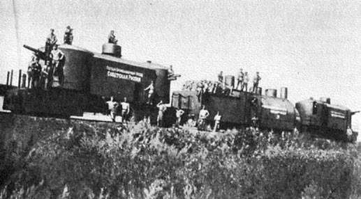 Бронепоезд номер 98 «Советская Россия»